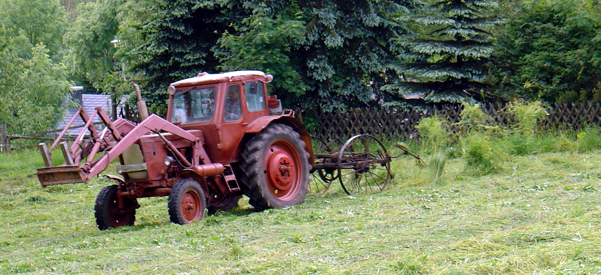 Belarus MTS 50 mit Gabelheuwender